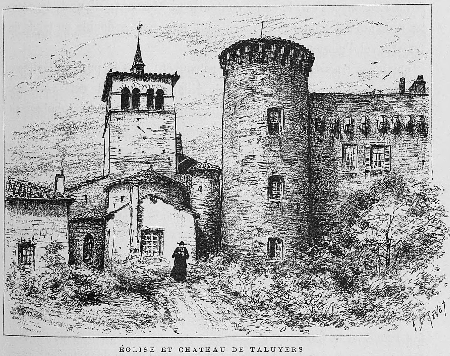 Aux environs de Lyon / Monsieur Josse ; préface de M. Coste-Labaume ; édition illustrée de 250 dessins de J. Drevet.